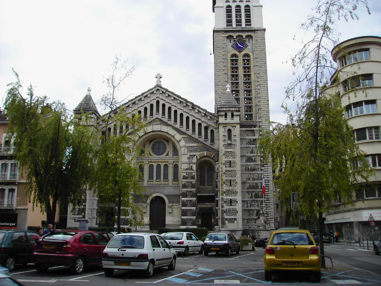 Eglise Saint Joseph à Grenoble